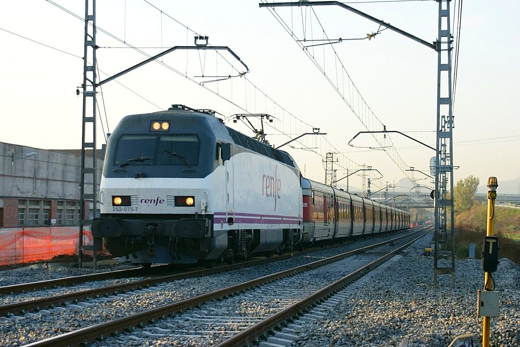 Catalan Talgo amb la branca 2B2 i traccionat per la locomotora 252.075 de Renfe Operadora passant sigilosament degut a una limitació de velocitat per obres, per la línia Barcelona-Girona-Portbou just abans de fer entrada a l'estació de Mollet-Sant Fost (Vallès Oriental).